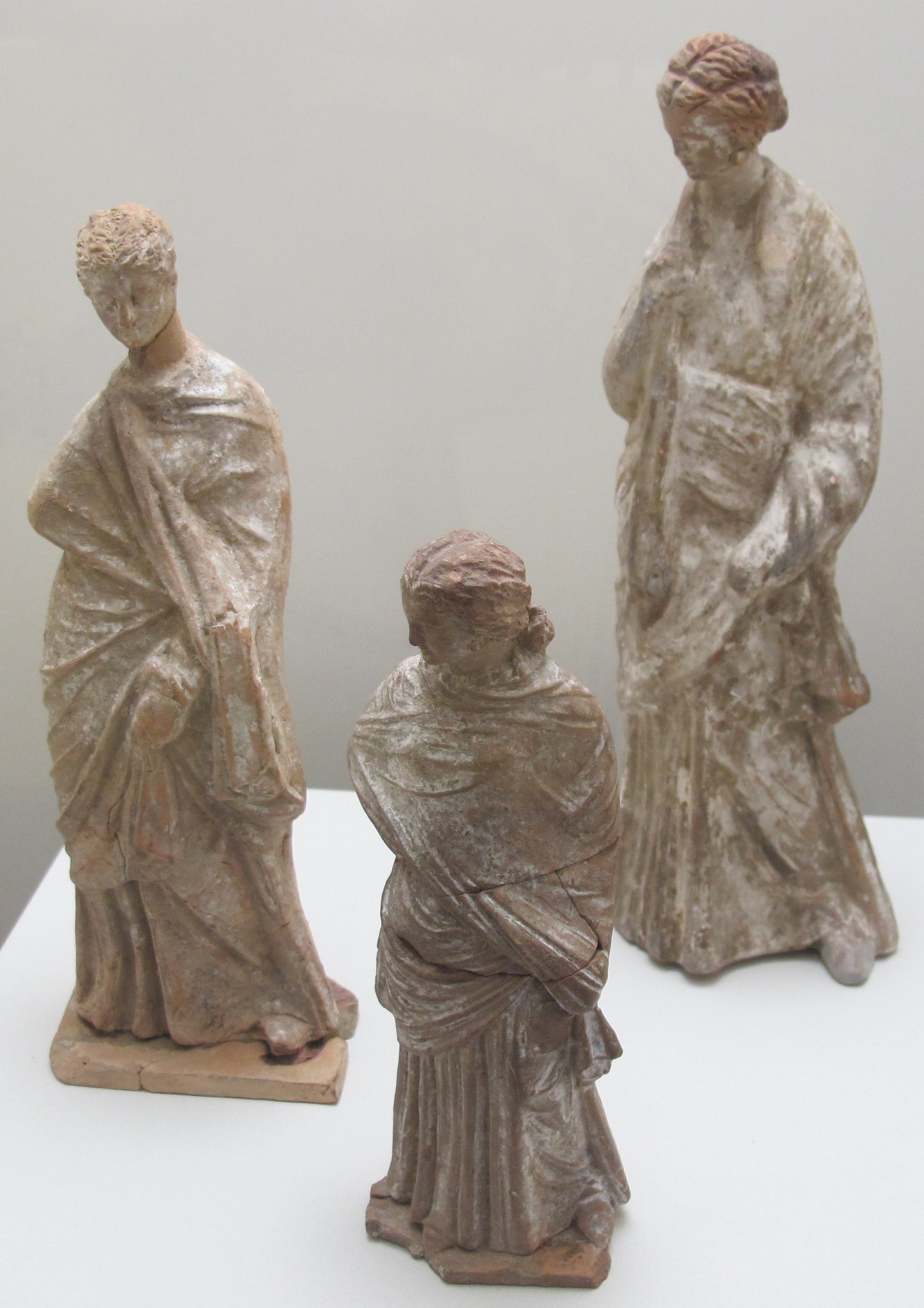 Tanagra (forse). tre statuette femminili, IV-III sec. ac. Grassimuseum Lipsia